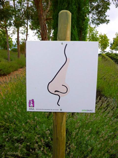 Parque de los Sentidos (Noáin, Navarra)